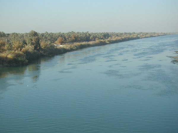 رود دجله